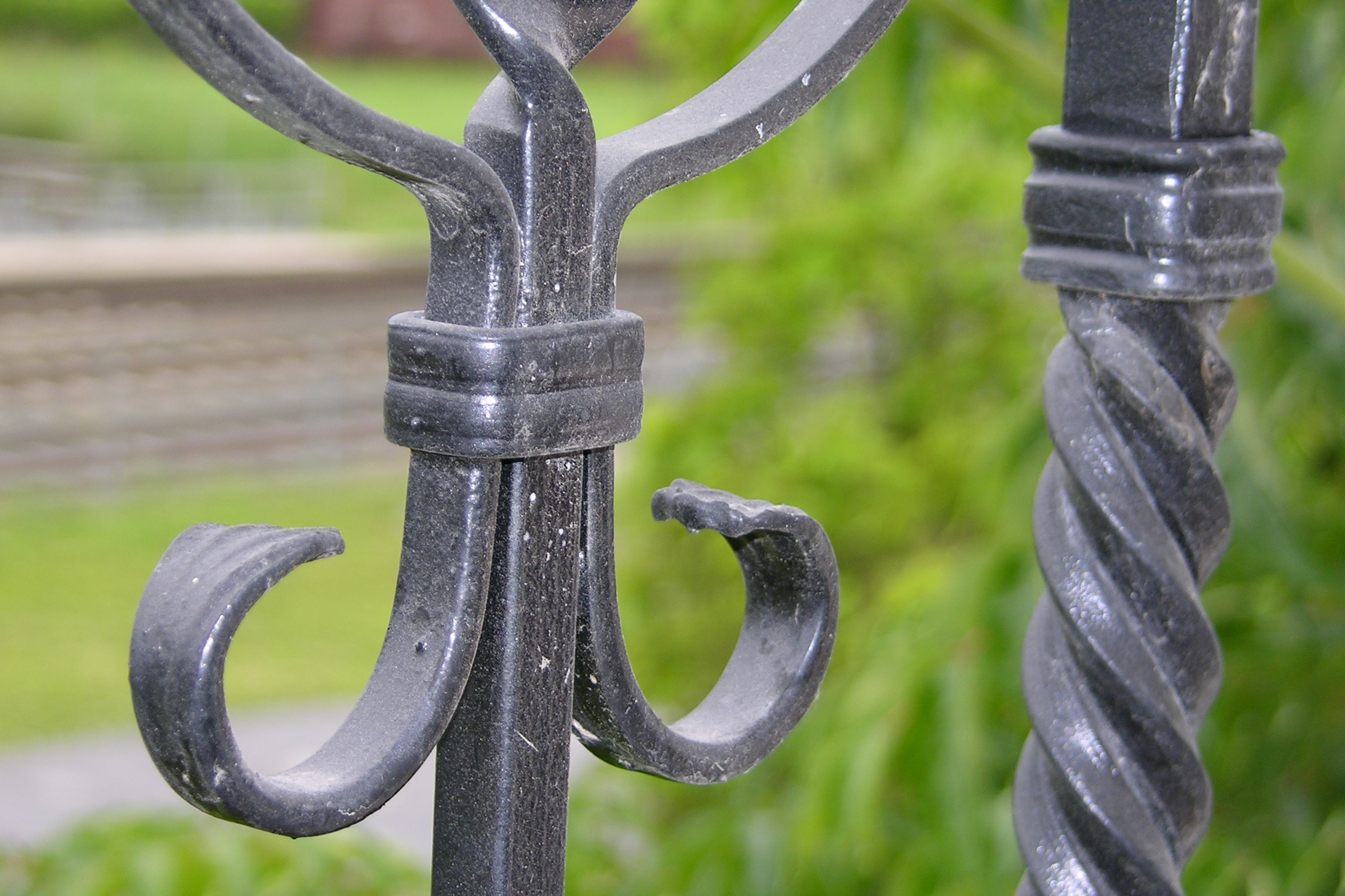 Bund bei Eisenverbindung (Beispiel)